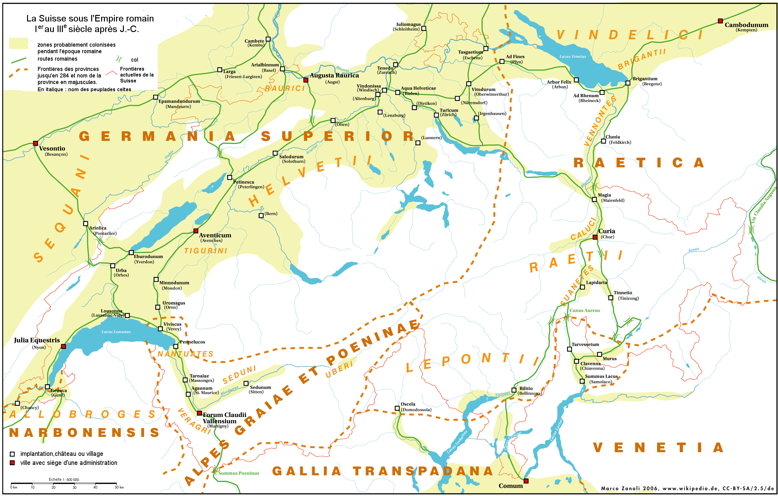 Die Schweiz im 1.–3. Jahrhundert n. Chr. unter römischer Herrschaft. Die Provinzgrenzen ca. 90. n. Chr. bis 284 n. Chr. (Reichsreform des Diokletian)